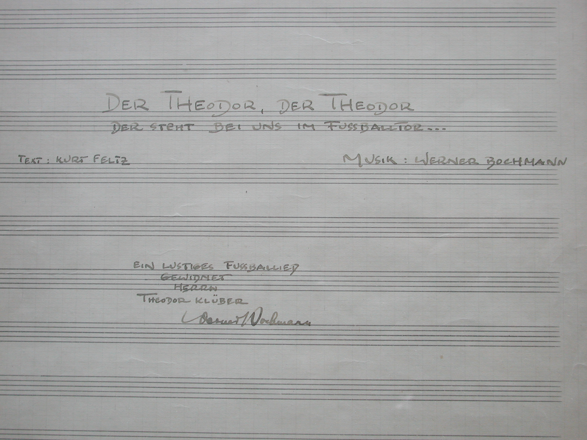 Scan der handschriftlichen Widmung von Werner Bochmann (Komponist) auf dem Notendeckblatt „Der Theodor, der Theodor, der steht bei uns im Fussballtor…“ von 1948. Widmungstext: „Ein lustiges Fussballied, gewidmet Herrn Theodor Klüber“, gez. Werner Bochmann. Der Text stammt von Kurt Feltz, gesungen wurde das Lied später von Theo Lingen.